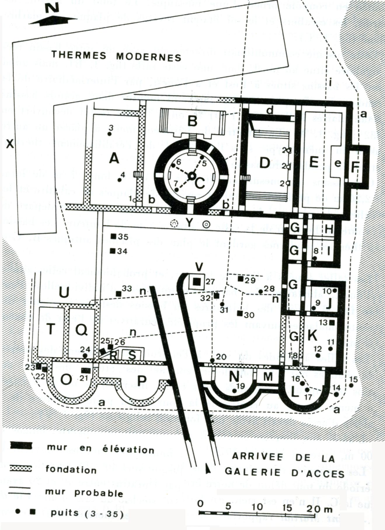 plan des thermes gallo-romains d'Evaux-les-Bains d'après G. Janicaud